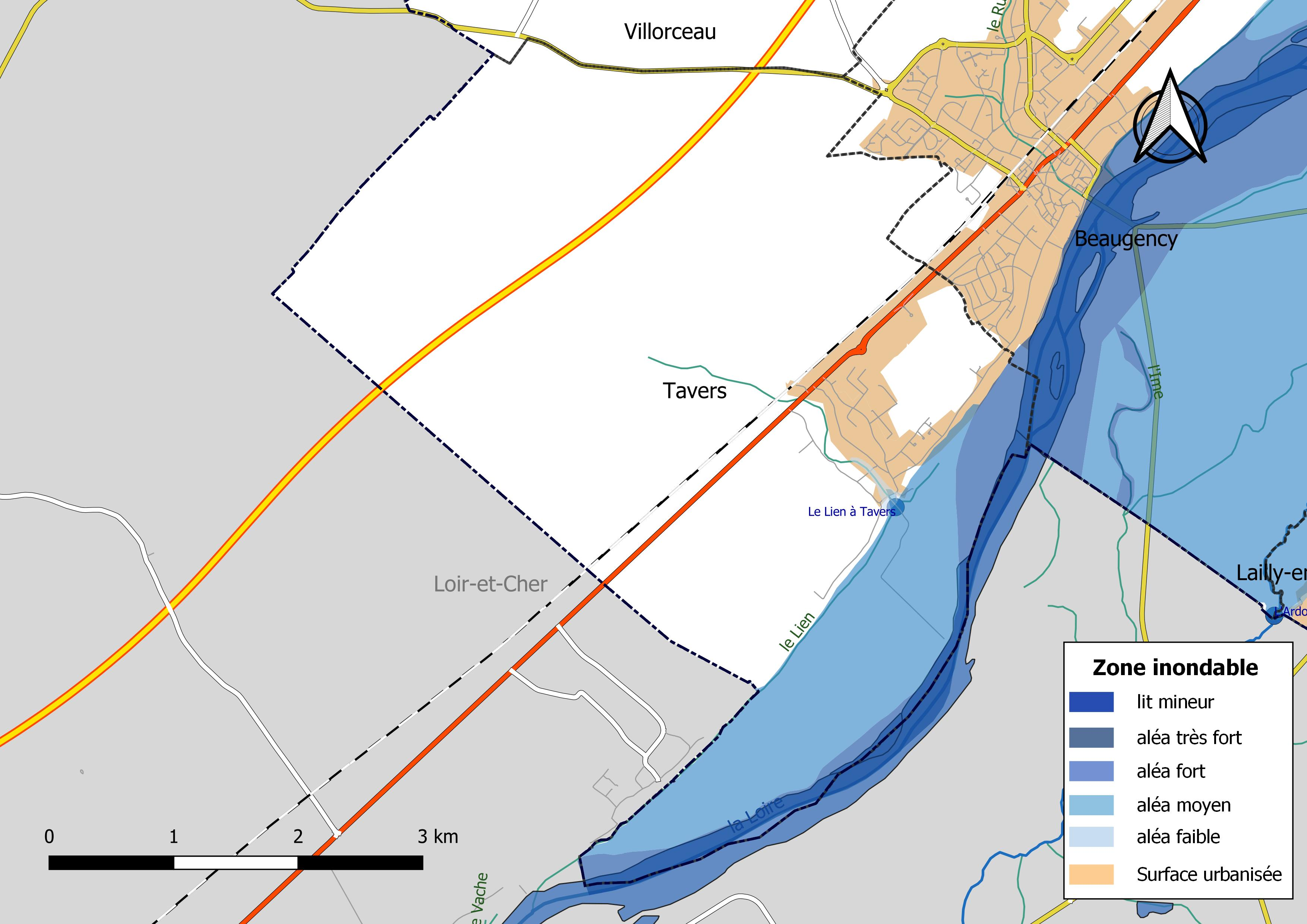 Zone inondable et réseaux hydrographique et routier de la commune de Tavers (Loiret, France).